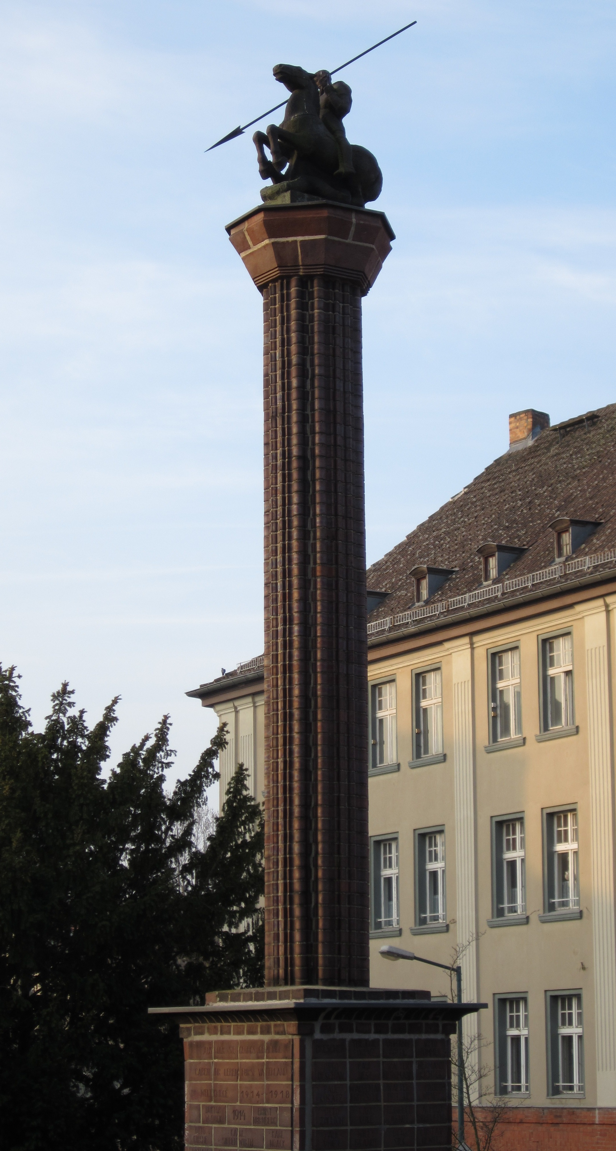 Denkmal für die Gefallenen des Ersten Weltkrieges in Frankfurt (Oder) an der St.-Georg-Kirche